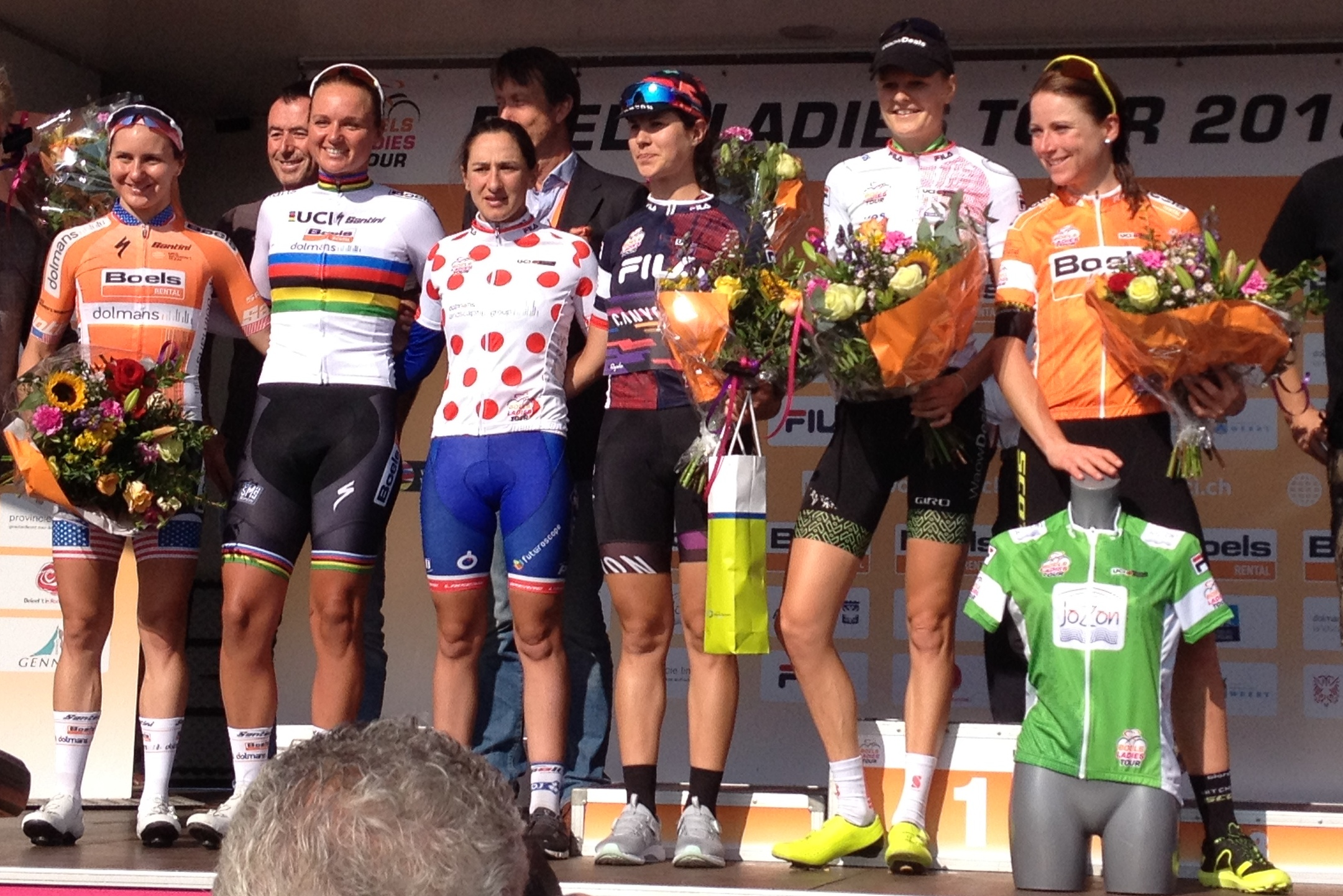 5e etappe van de Boels Ladies Tour 2018 door Zuid-Limburg, finish in Sittard op het Tom Dumoulin Bike Park. V.l.n.r. Megan Guarnier (laatste wedstrijd voor Boels-Dolmans), Chantal Blaak (ritwinnaar en strijdlustigste), Eugénie Duval (bergtrui), Elena Cecchini (sprinttrui), Jeanne Korevaar (jongerentrui) en Annemiek van Vleuten (puntentrui en eindwinnares).